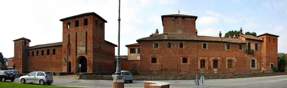 Panorama del castello di Scaldasole